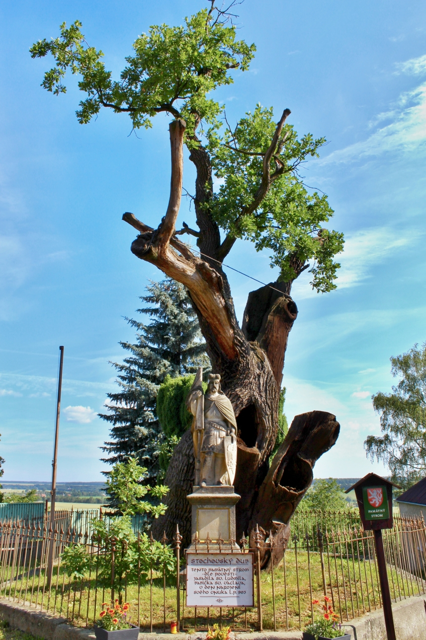 Stochov